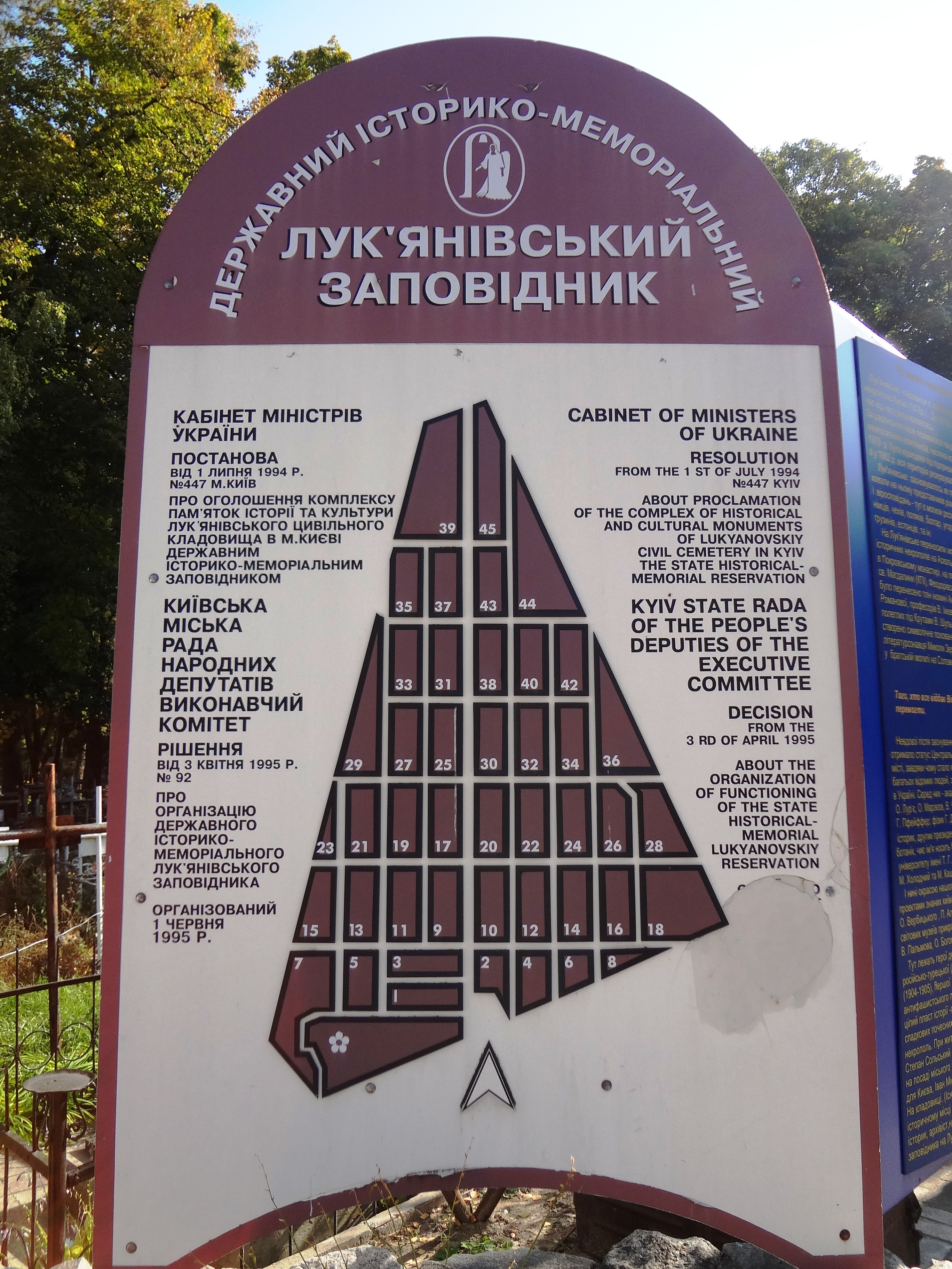 Комплекс пам'яток «Лук'янівське кладовище» (ДІМ «Лук'янівський історико-меморіальний заповідник»), Київ, Дорогожицька вул., 7